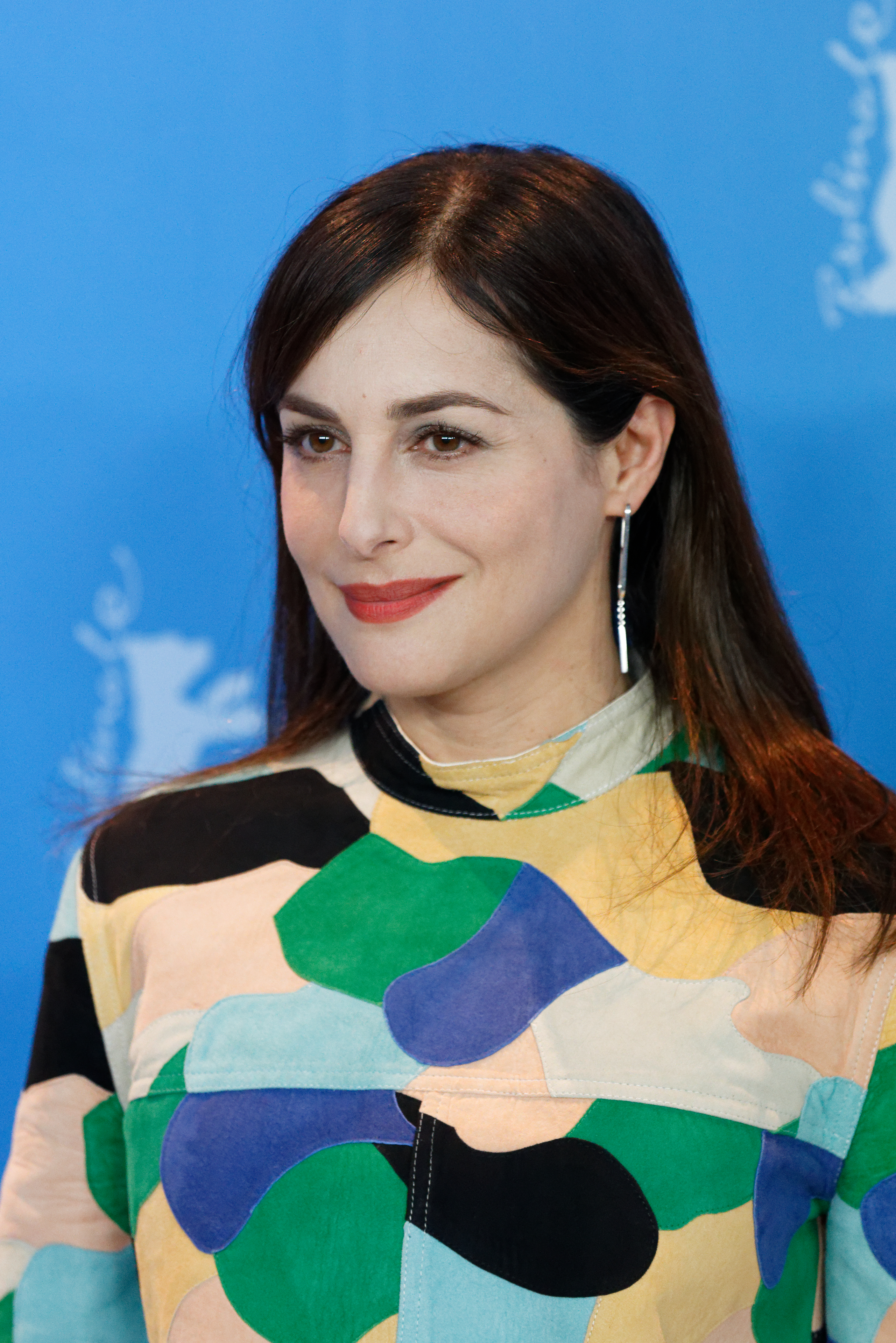 Amira Casar beim Photo Call zu Call Me By Your Name bei der Berlinale 2017